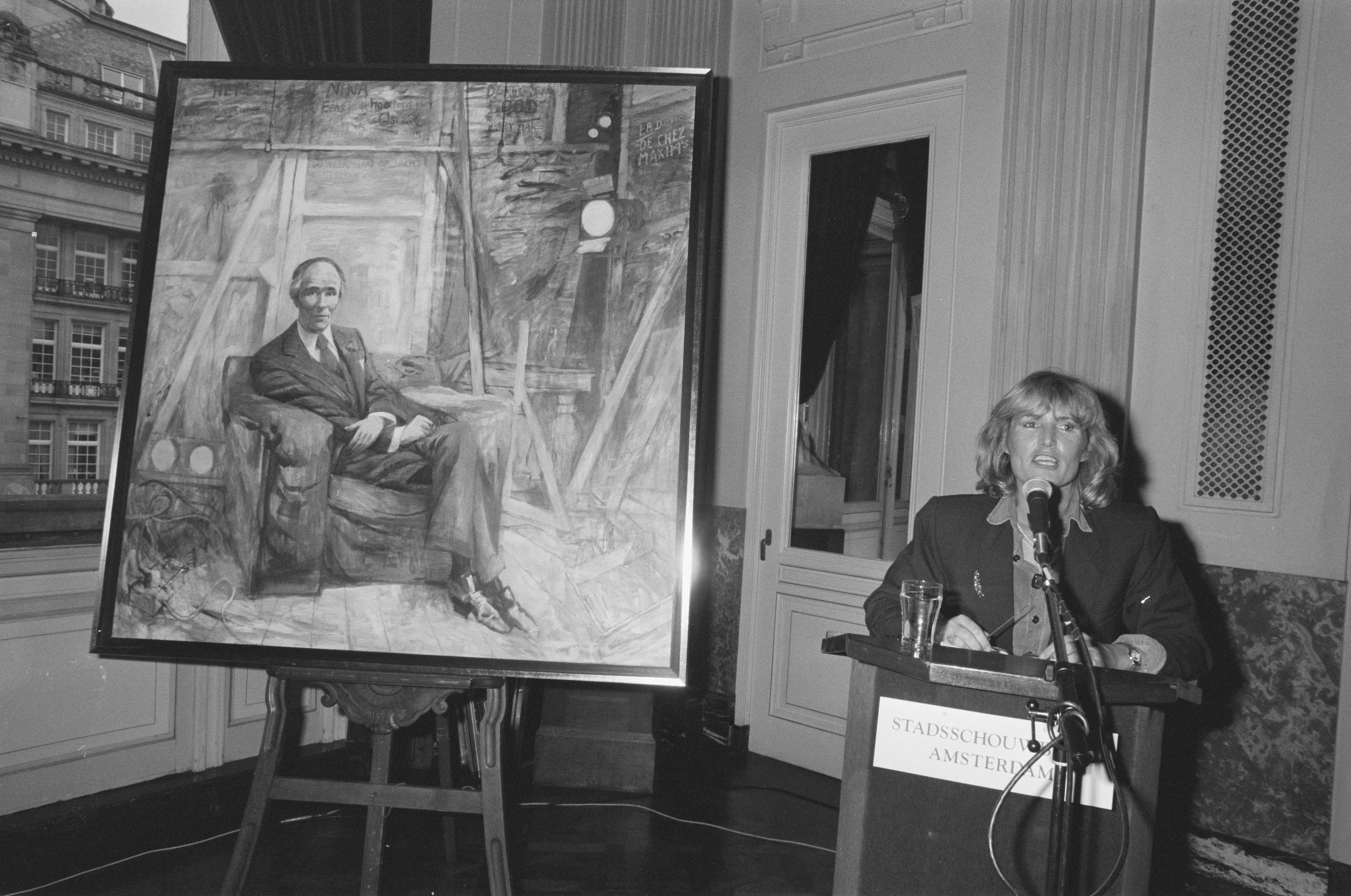 Schilderij van Guus Oster door Nicolaas Wijnberg in de Stadsschouwburg Amsterdam (NL), rechts Annemarie Oster Datum 29 maart 1988